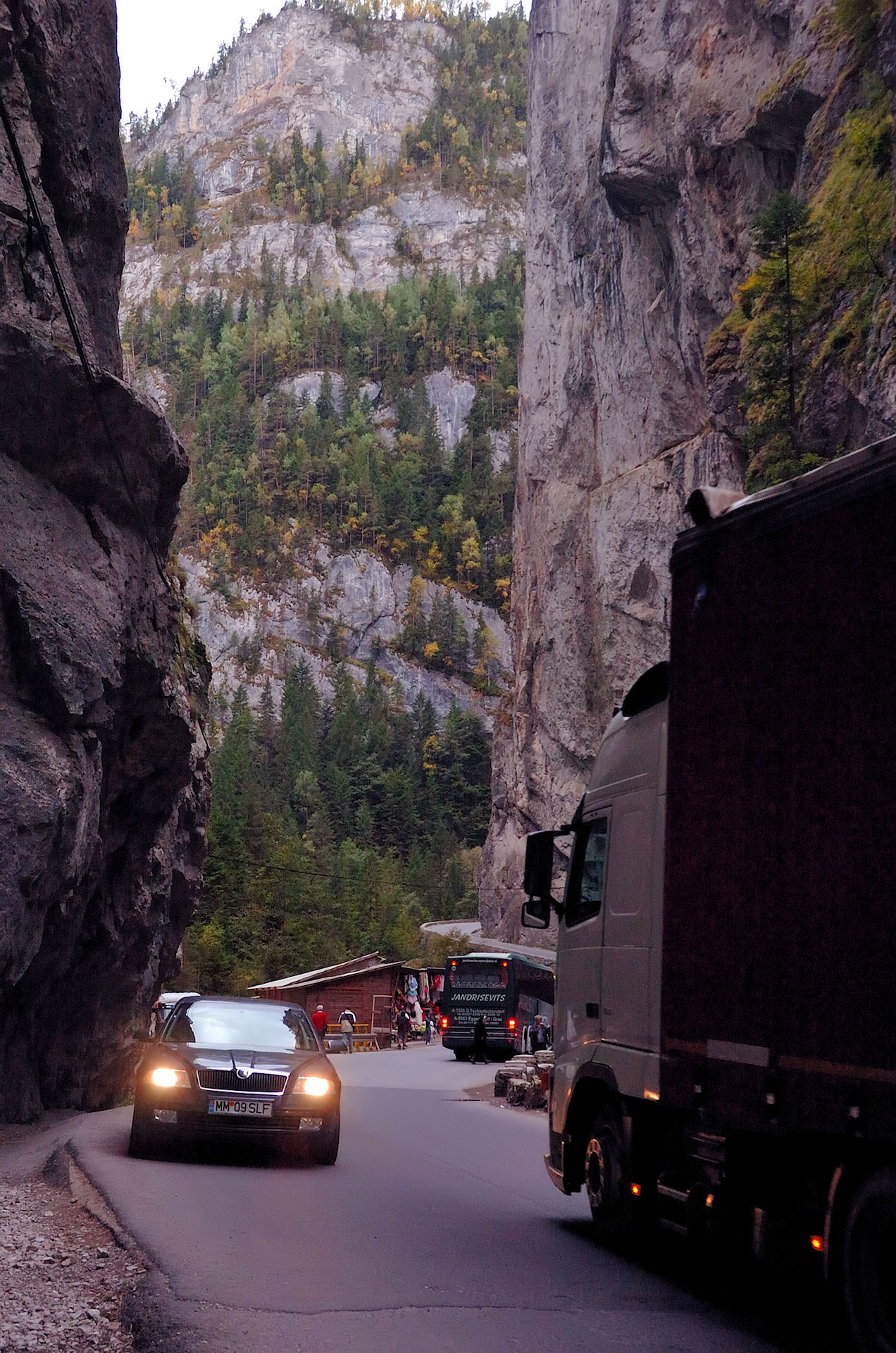 Abends in der Bicaz-Klamm. Reger Straßenverkehr quält sich über die enge Passstraße.